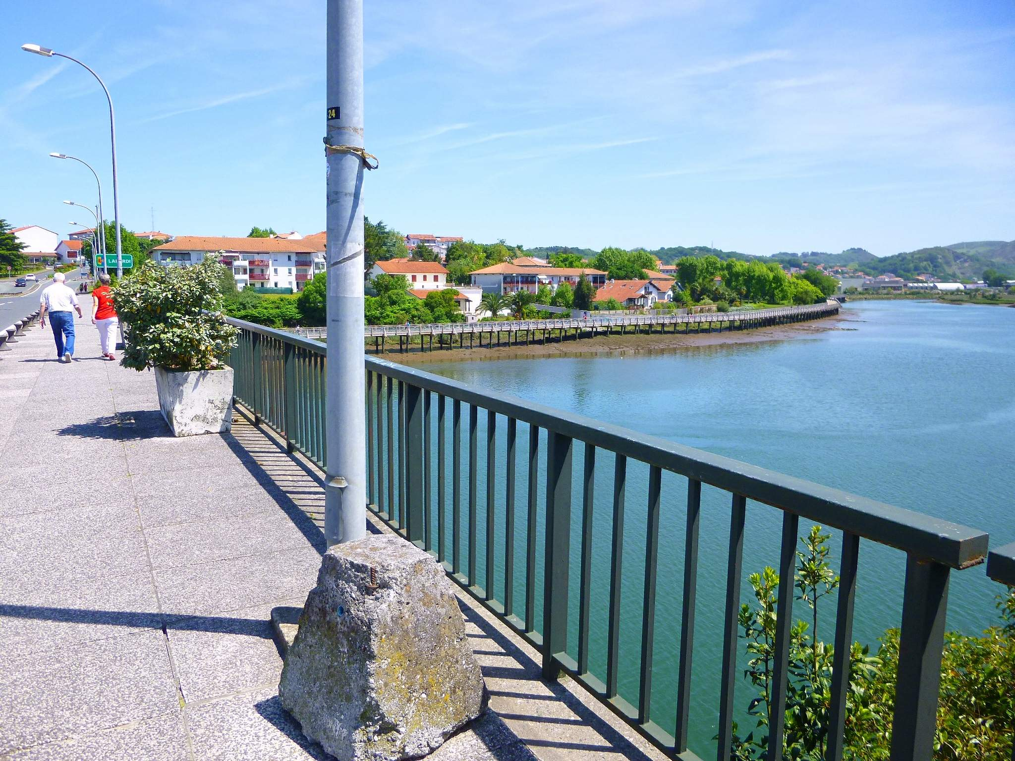 El Bisasoa en Irún